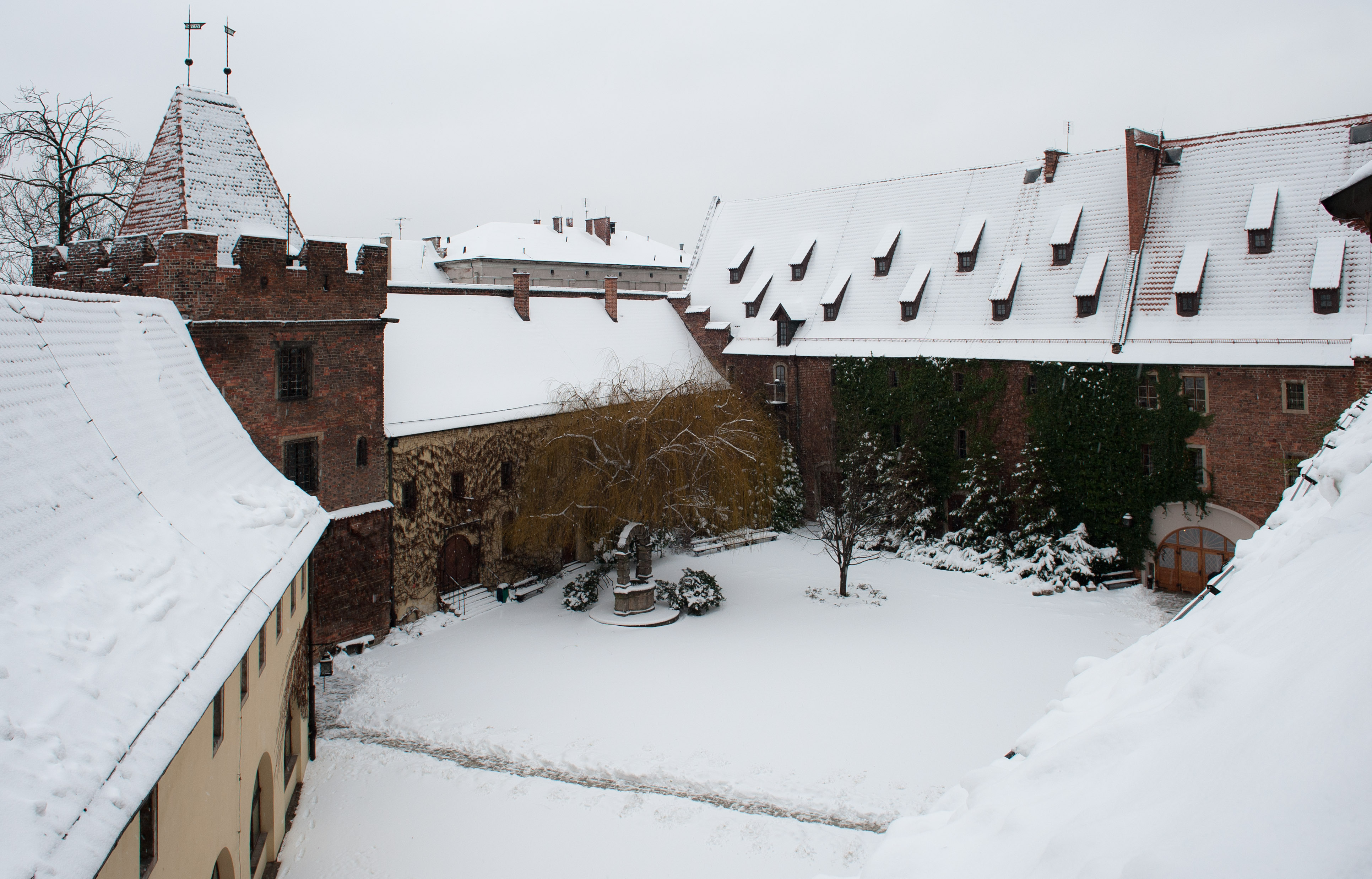 Arsenał Miejski, ul. Cieszyńskiego 9, Wrocław, Dziedziniec